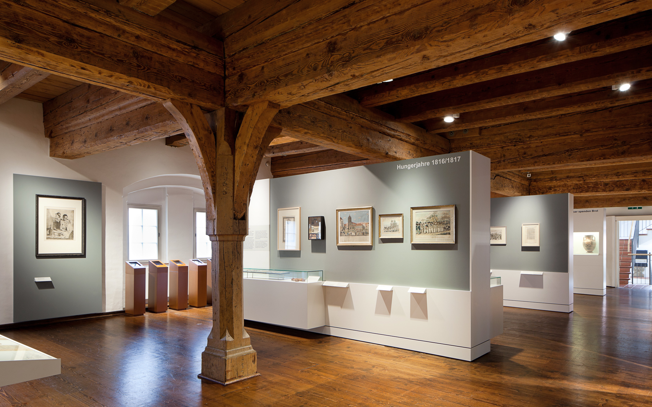 Blick in die Ausstellung